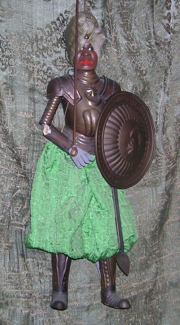 Pupo Siciliano